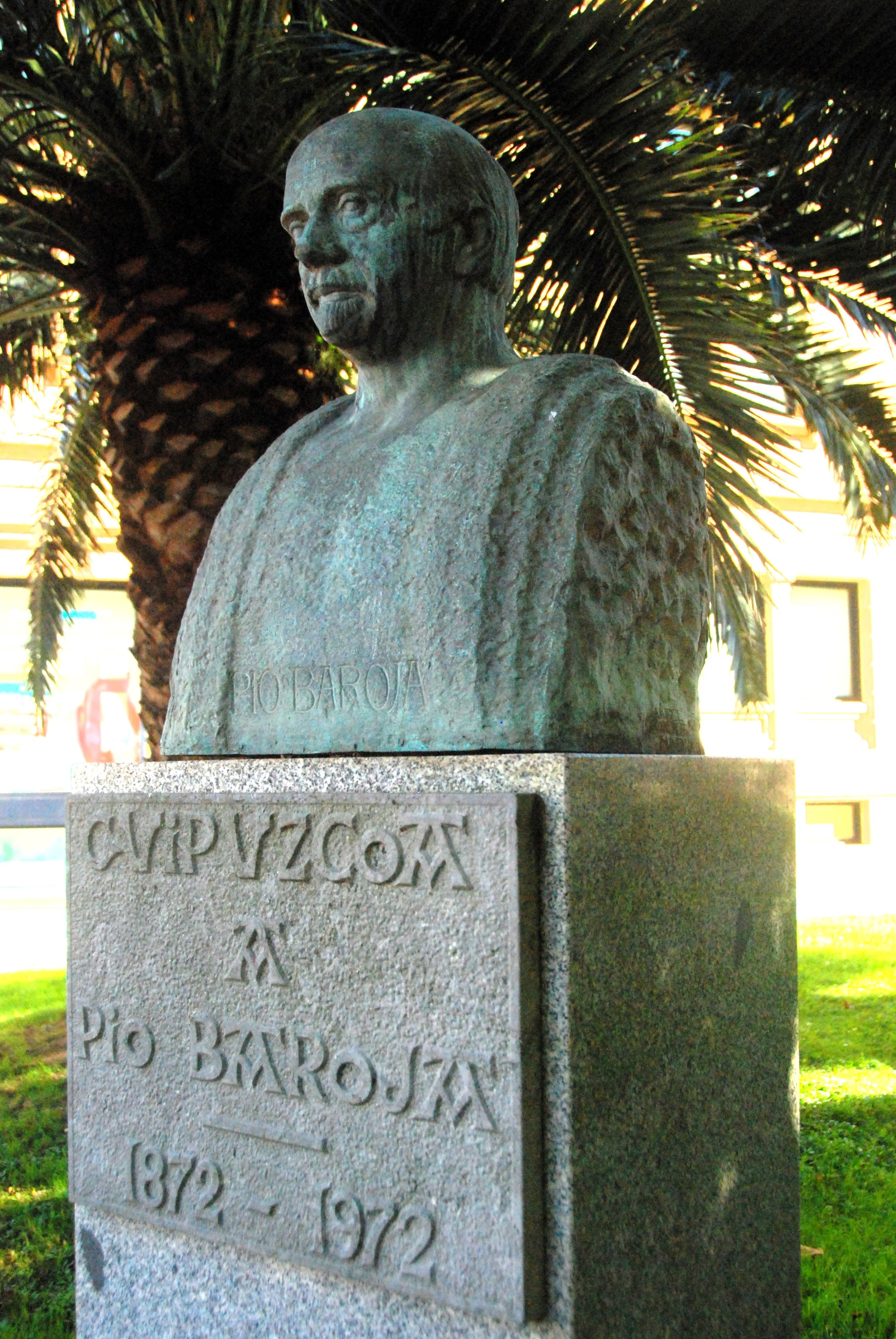 Pio Baroja idazlearen eskultura Donostian